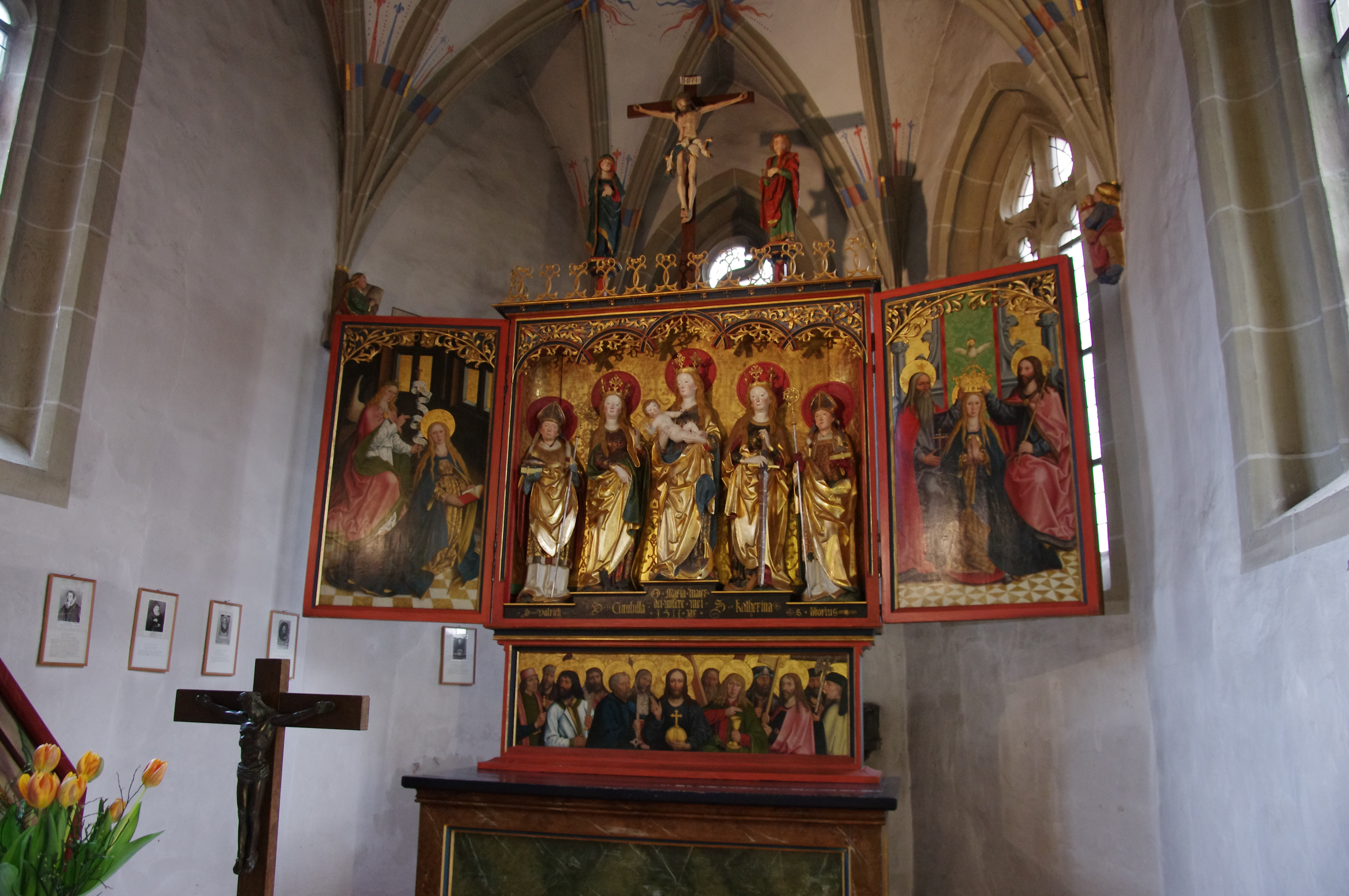 Kloster Adelberg: Altar von Bartholomäus Zeitblom in der Ulrichskapelle (Adelberg, Baden-Württemberg)